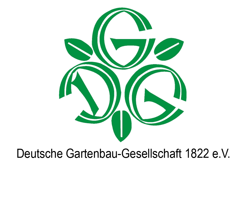 Deutsche Gartenbau-Gesellschaft 1822 e.V. Logo